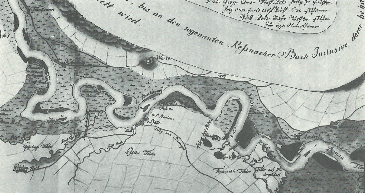 Donaulauf bei Wörth Donau 1749